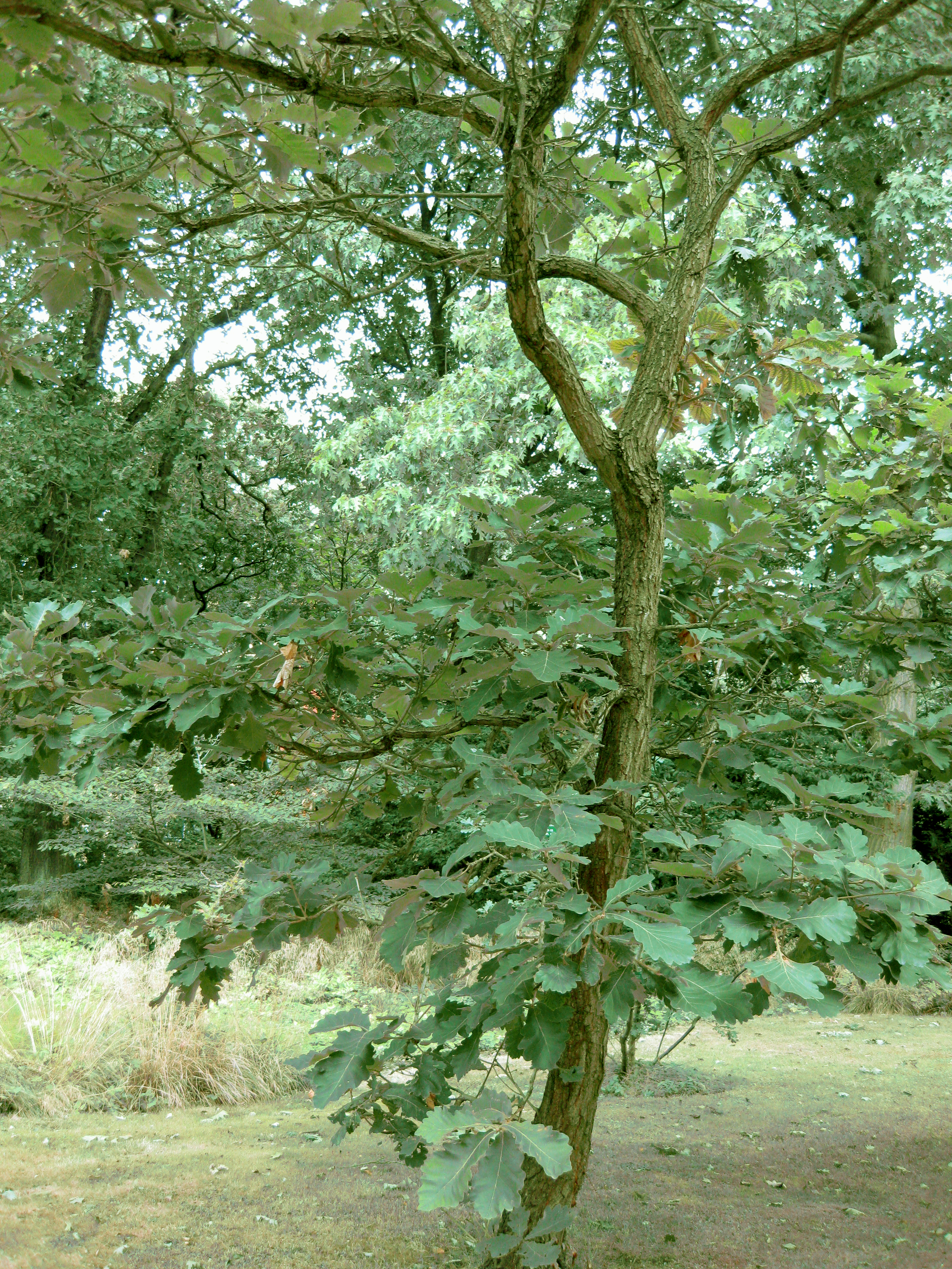 Quercus dentata (keisaraeik) tree in the botanical garden in Copenhagen.